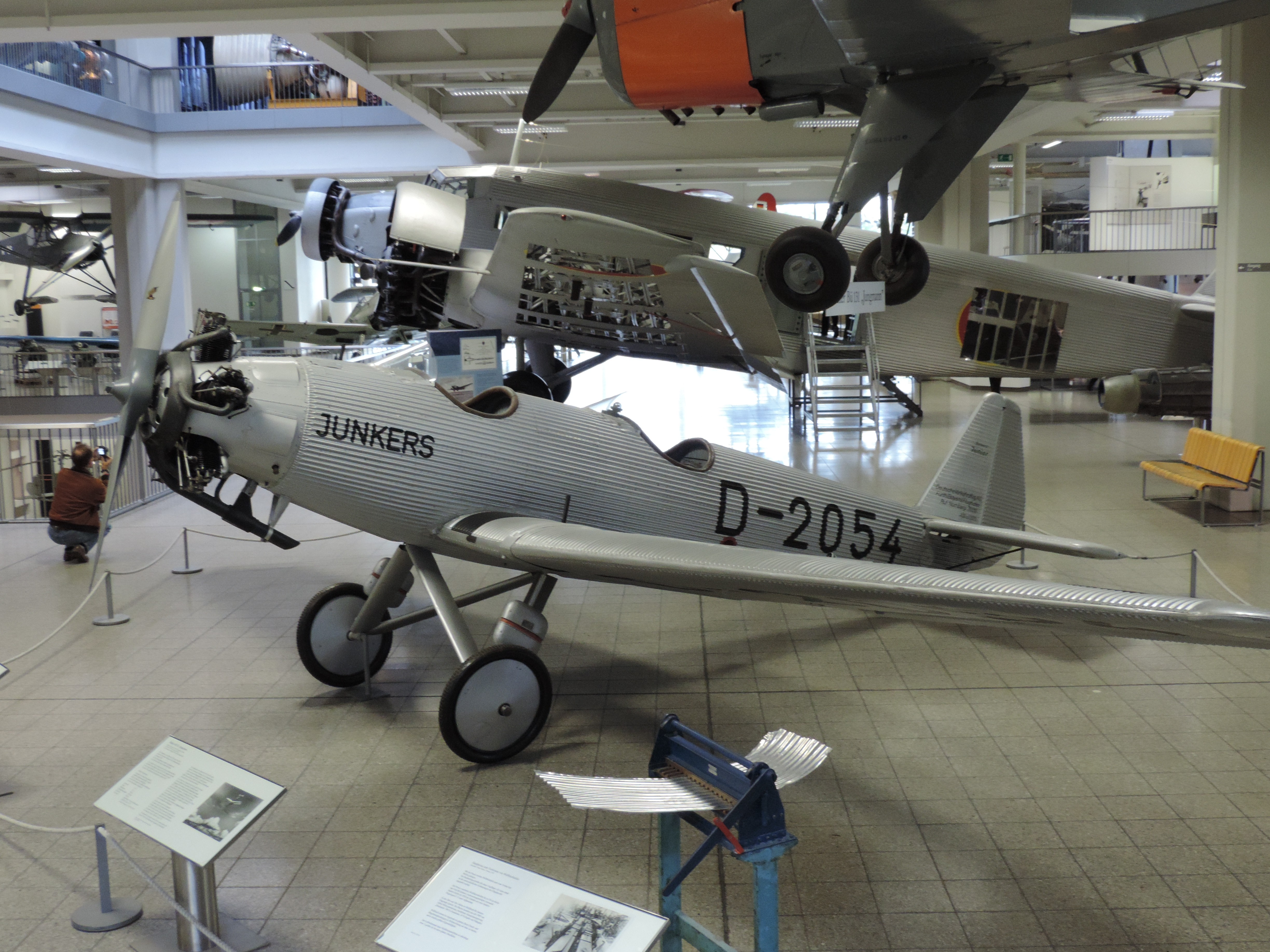 Junkers A 50 ci Junior im Deutschen Museum München